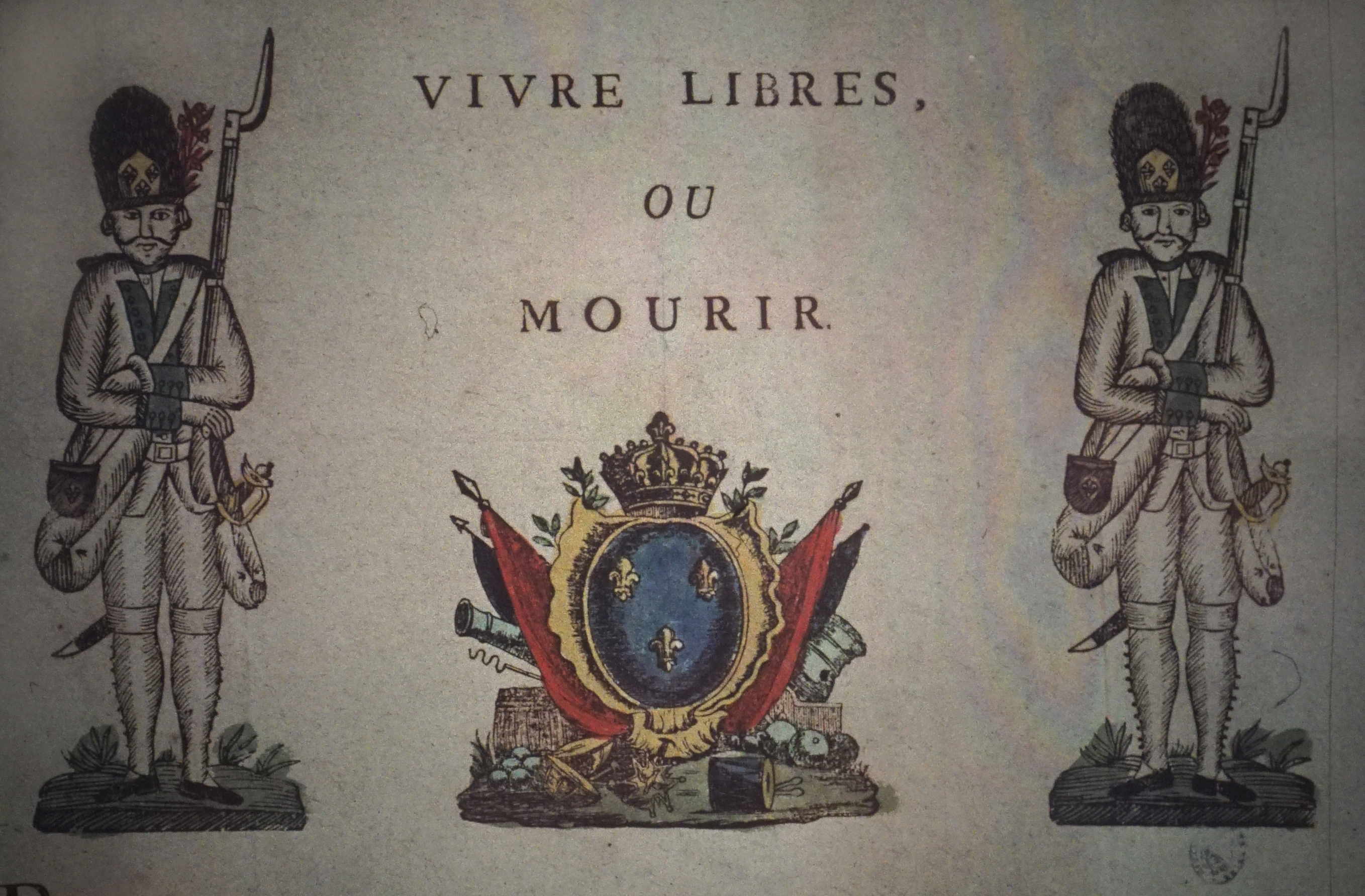 Image du 132e RI.